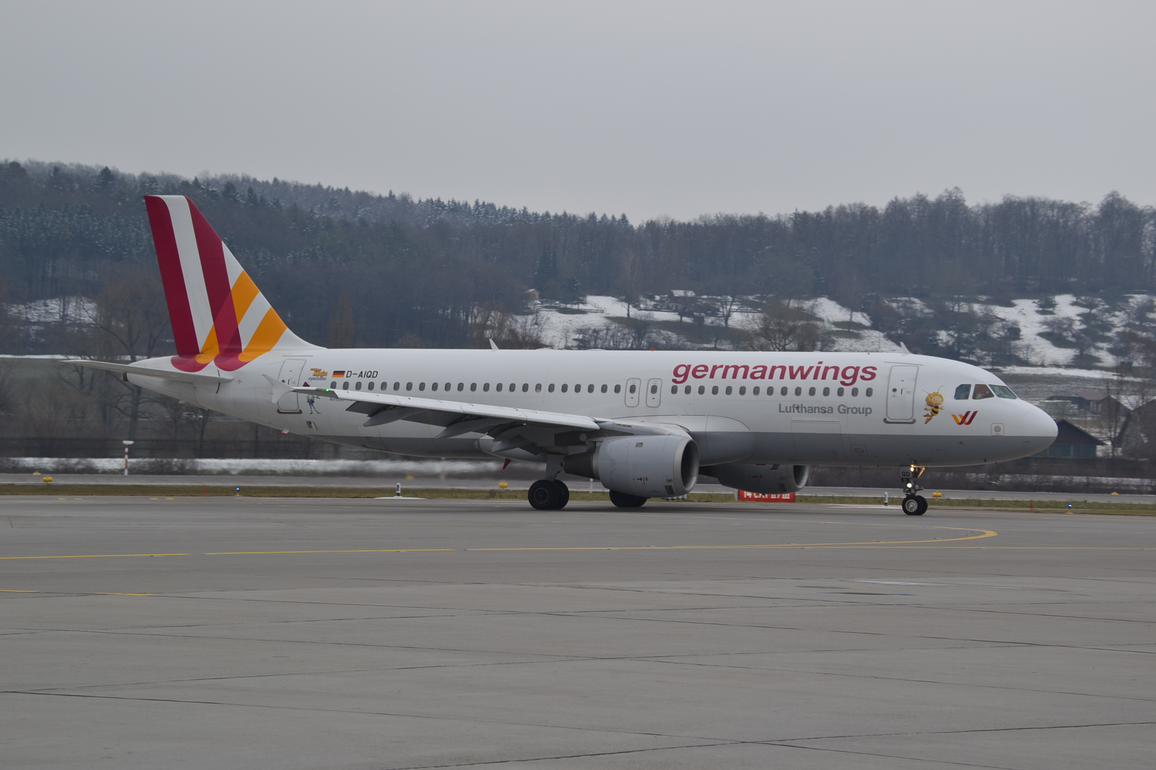 Airbus A320 of Germanwings at Zurich-ZRH, Switzerland, 21/01/15.